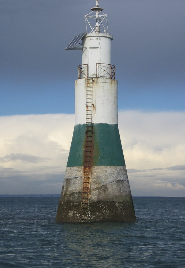 Petit phare de Pléneuf (Côtes d'Armor)